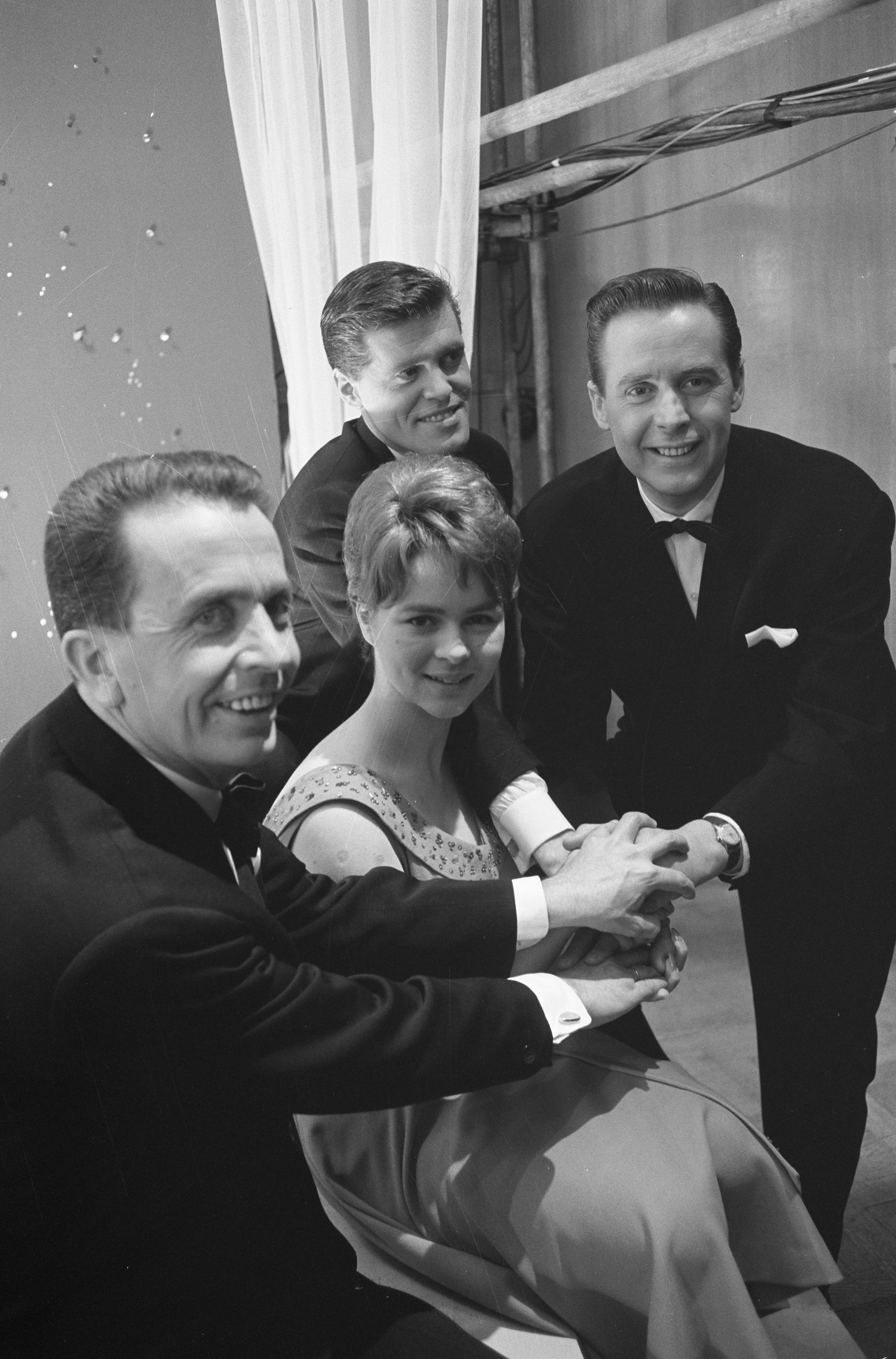 Collectie / Archief : Fotocollectie Anefo Reportage / Serie : [ onbekend ] Beschrijving : Eurovisie Songfestival 1962 te Luxemburg, Spelbrekers met Conny Froboes, op de achtergrond Francois Deguelt Datum : 18 maart 1962 Locatie : Luxemburg Trefwoorden : artiesten, songfestivals Persoonsnaam : Deguelt Francois, Froboes Conny Instellingsnaam : Spelbrekers Fotograaf : Pot, Harry / Anefo Auteursrechthebbende : Nationaal Archief Materiaalsoort : Negatief (zwart/wit) Nummer archiefinventaris : bekijk toegang 2.24.01.05 Bestanddeelnummer : 913-6617 Reacties Geplaatst door Maaike op 19 juli 2012 - 20:52. Persoonsnamen: Theo Rekkers en Huug Kok (De Spelbrekers)